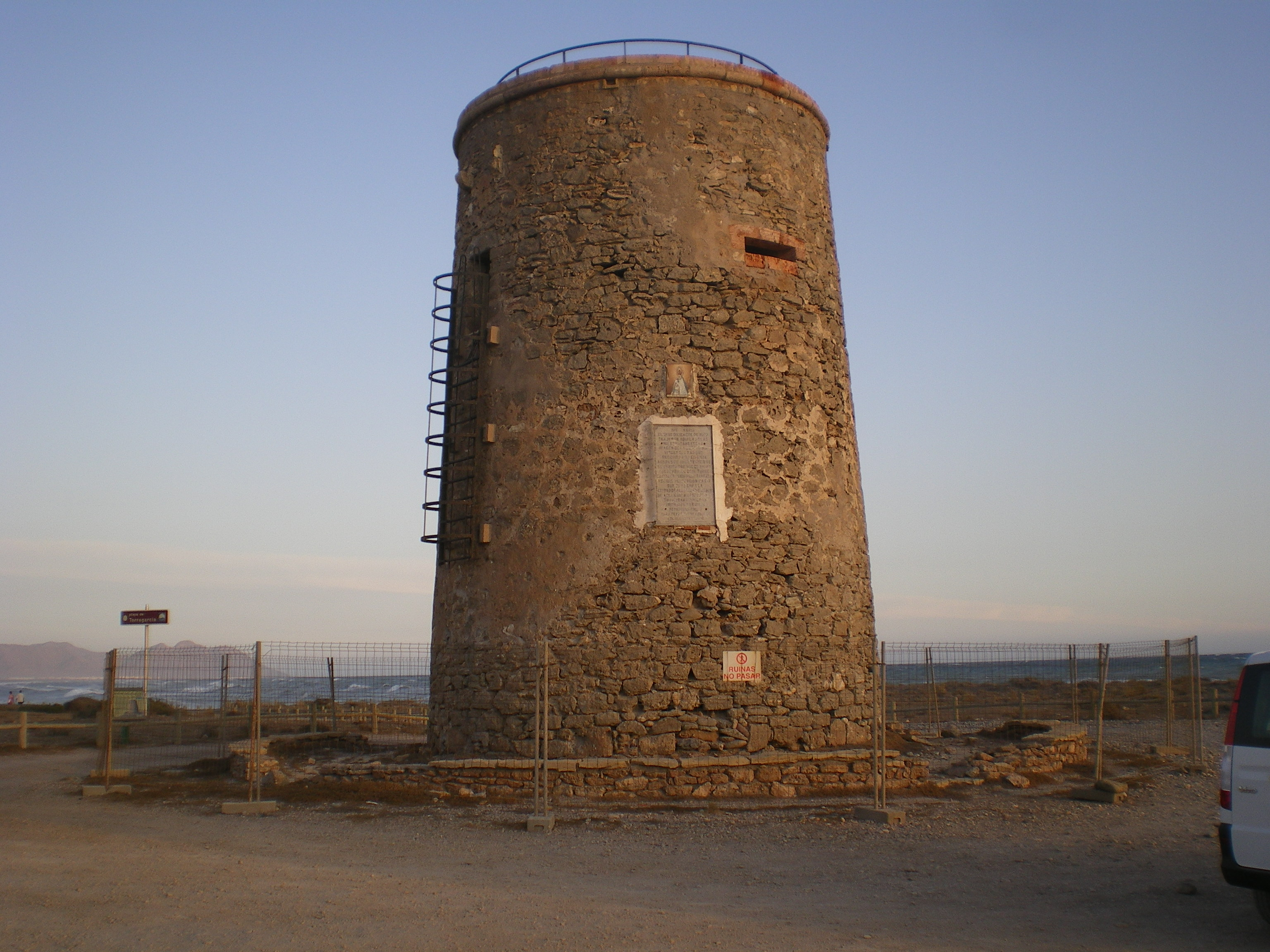 Fotografía de la Torre García, torre costera defensiva de Almería, Andalucía, España, tomada desde el noroeste al sureste.